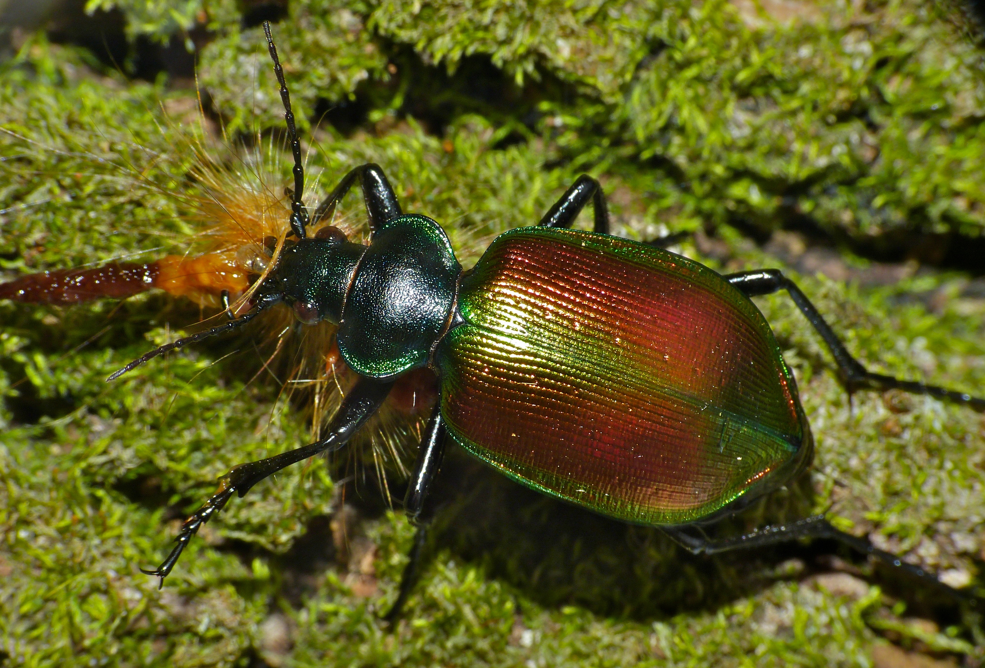 Viols-le-Fort, Hérault, FRANCE